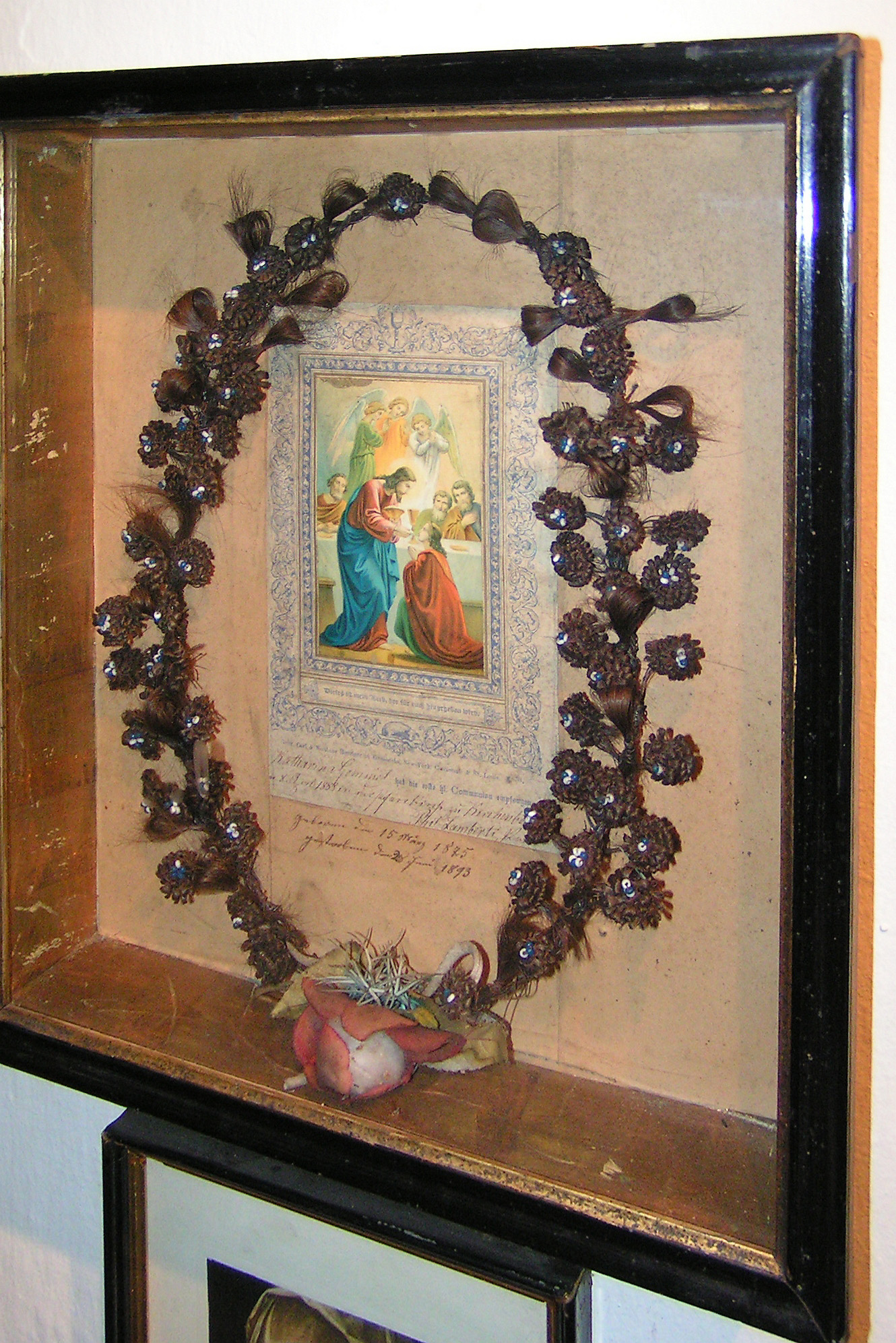 Solche Haarbilder wurden oft zur Erinnerung an Verstorbene im Wohnzimmer der Familie aufgehängt und bestehen aus einer kunstvoll geflochtenen Haarsträhne der Toten (Haarbild von Katharina Semmel aus Kirchenbollenbach bei Idar-Oberstein † 28. Juni 1893 im Alter von 18 Jahren)